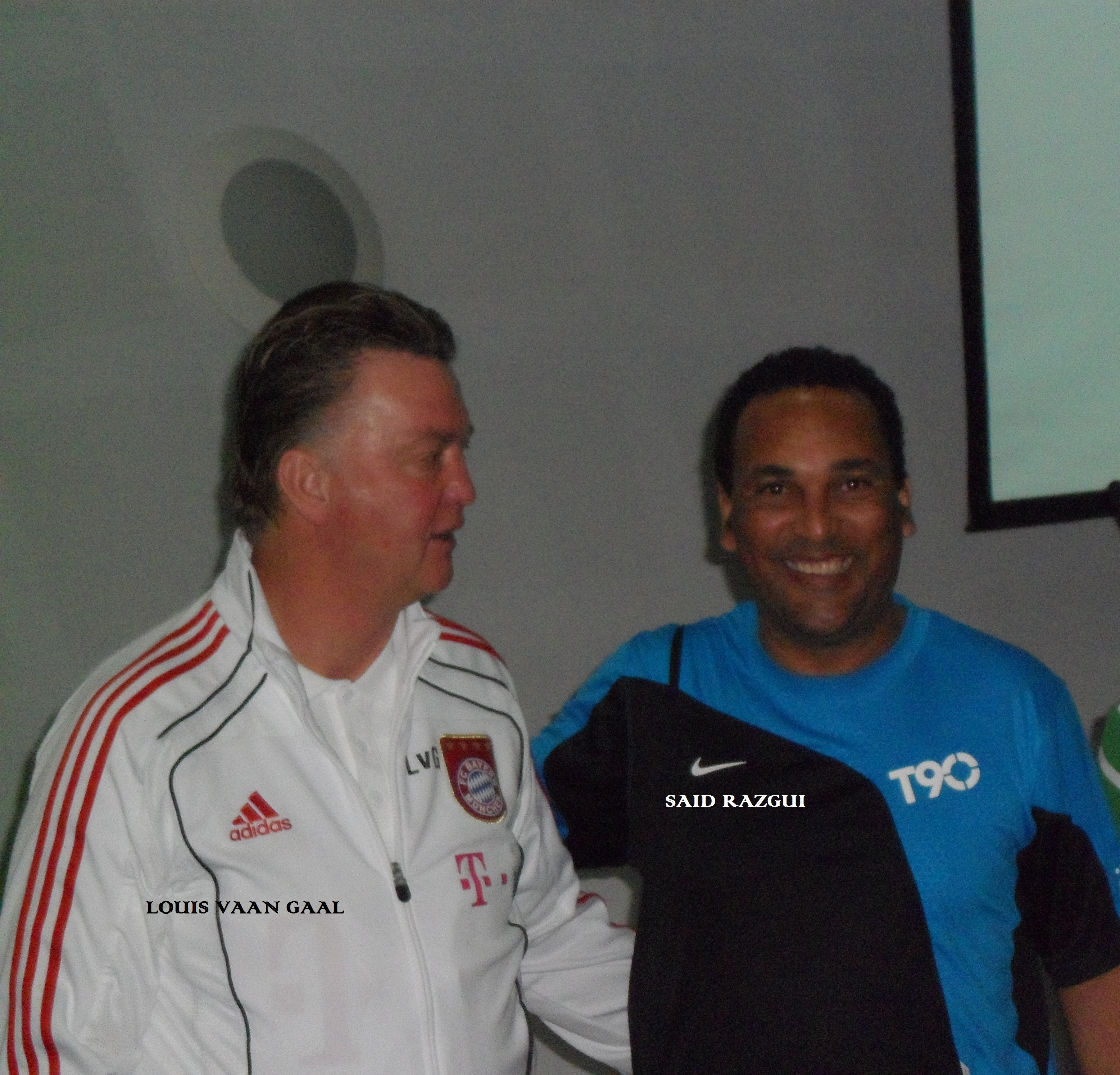 سعيد رزكي المحلل الفني و لاعب المنتخب سابقا